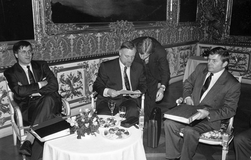 20.-21.12.1990 Konferenz der Regierungschefs der 16 Bundesländer der Bundesrepublik Deutschland in München 20.12. Empfang durch den bayerischen Ministerpräsidenten, Max Streibl, im Prinz-Carl-Palais